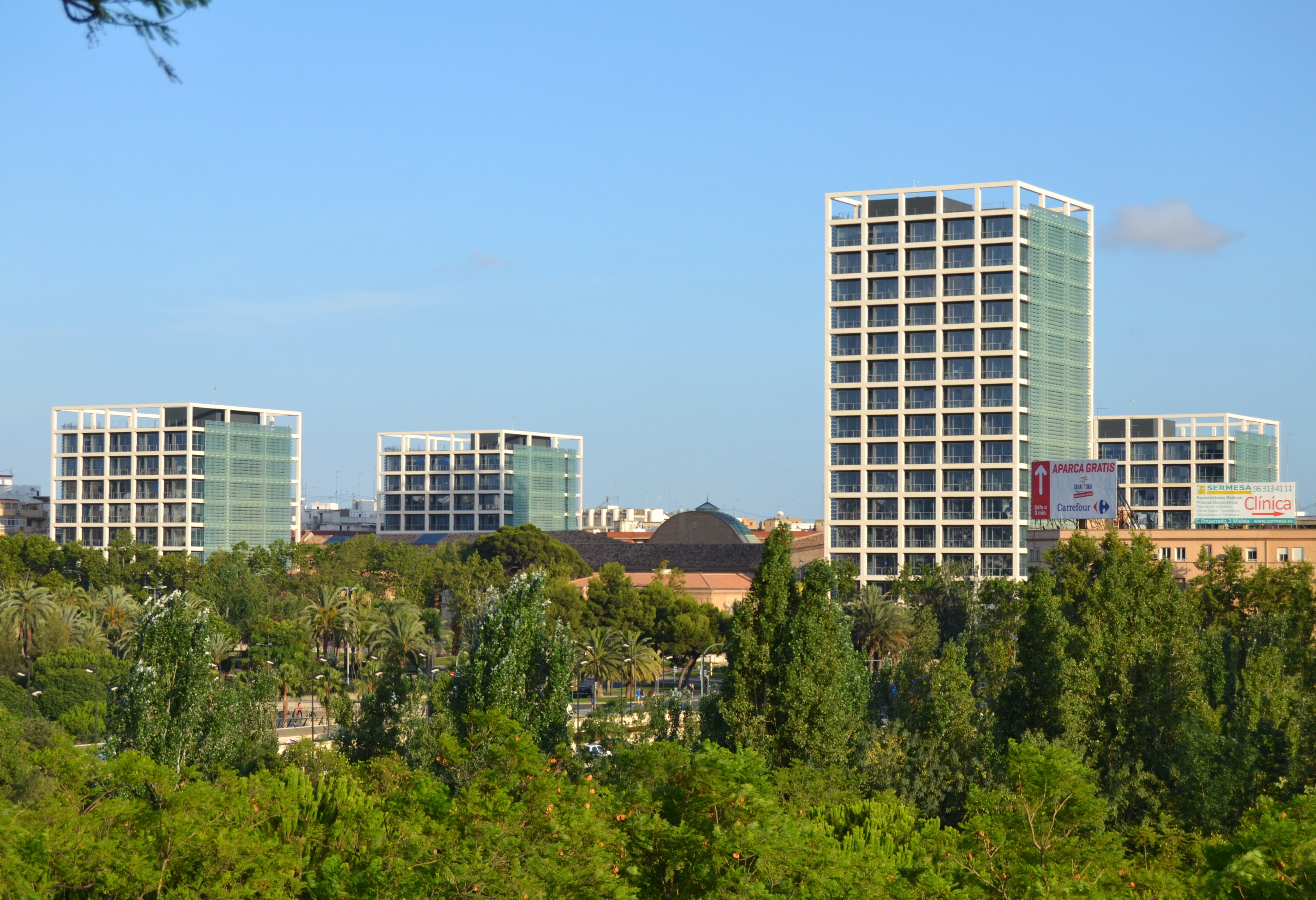 Vista de la ciutat administrativa nou d'octubre des del parc de Capçalera, València.